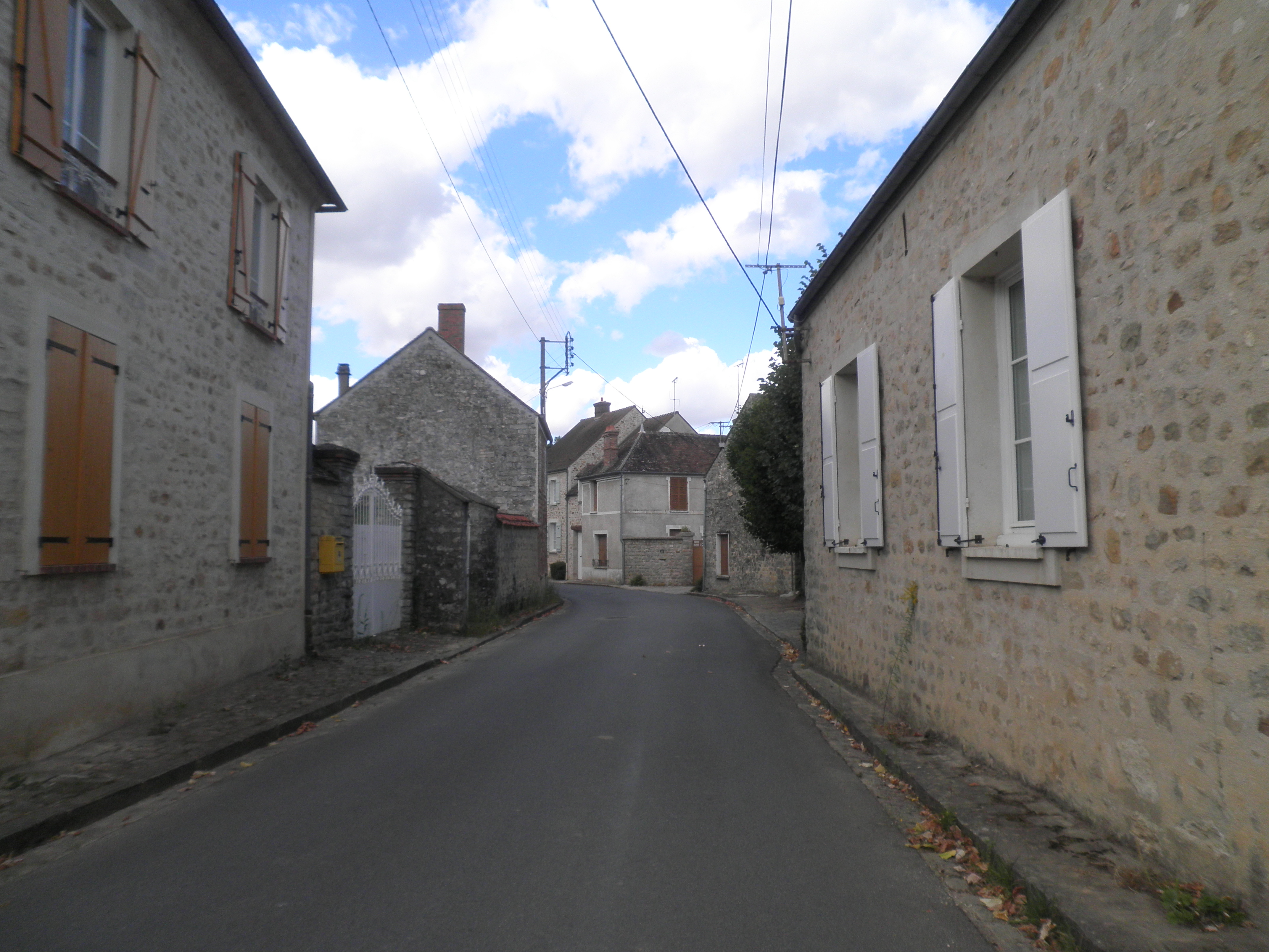 la Rue Grande, rue principale de Noisy-sur-École.